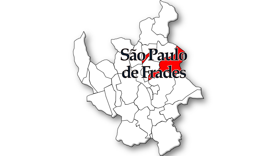 População